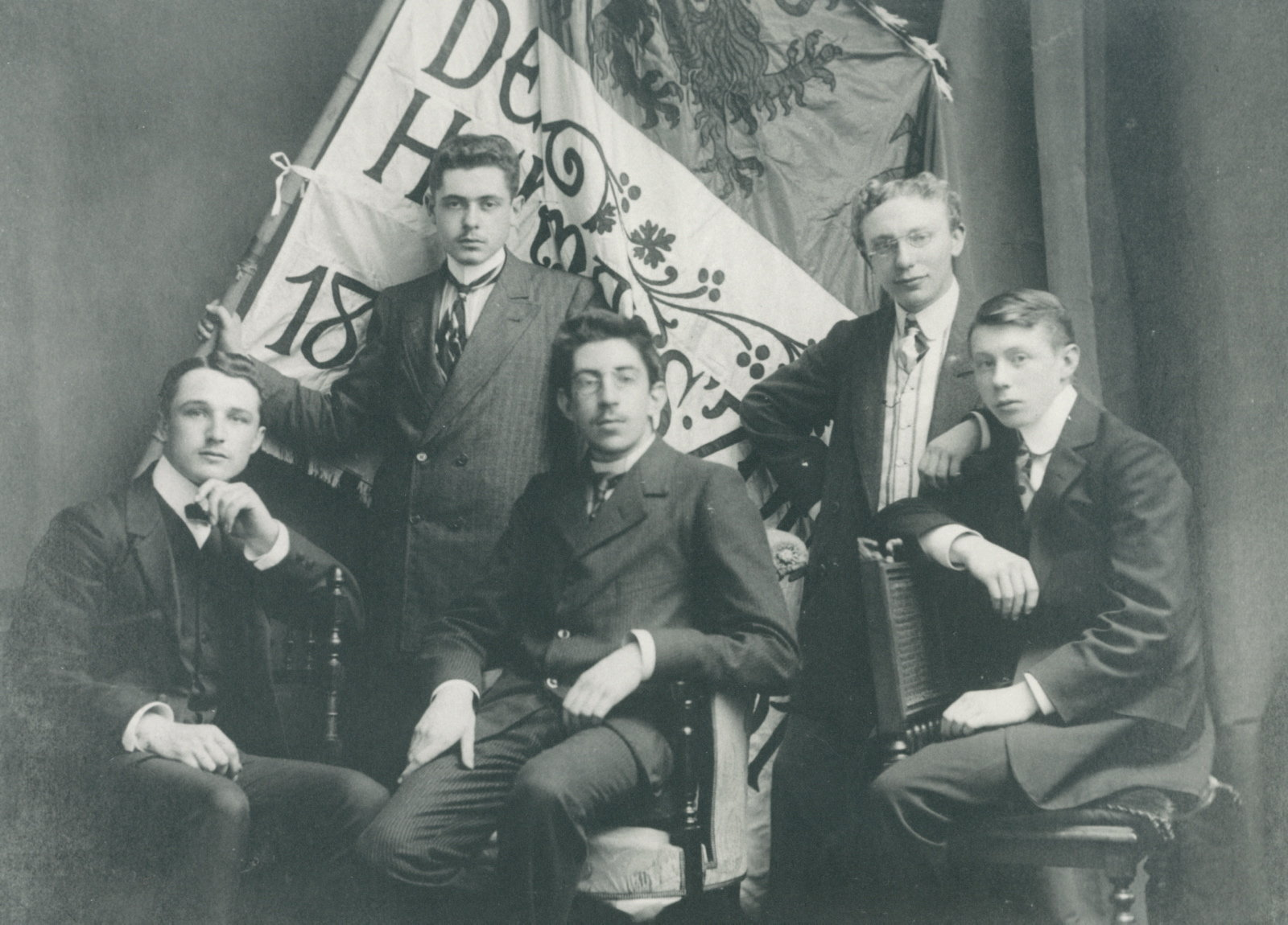 Bestuur De Heremanszonen